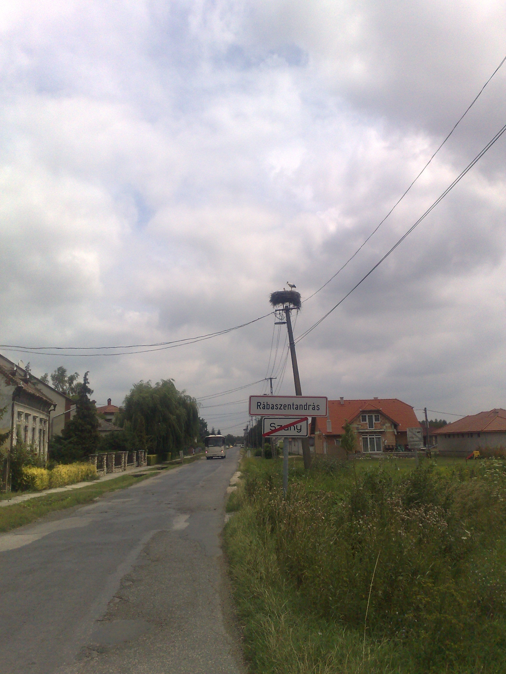 Gólyafészek Szany és Rábaszentandrás határán